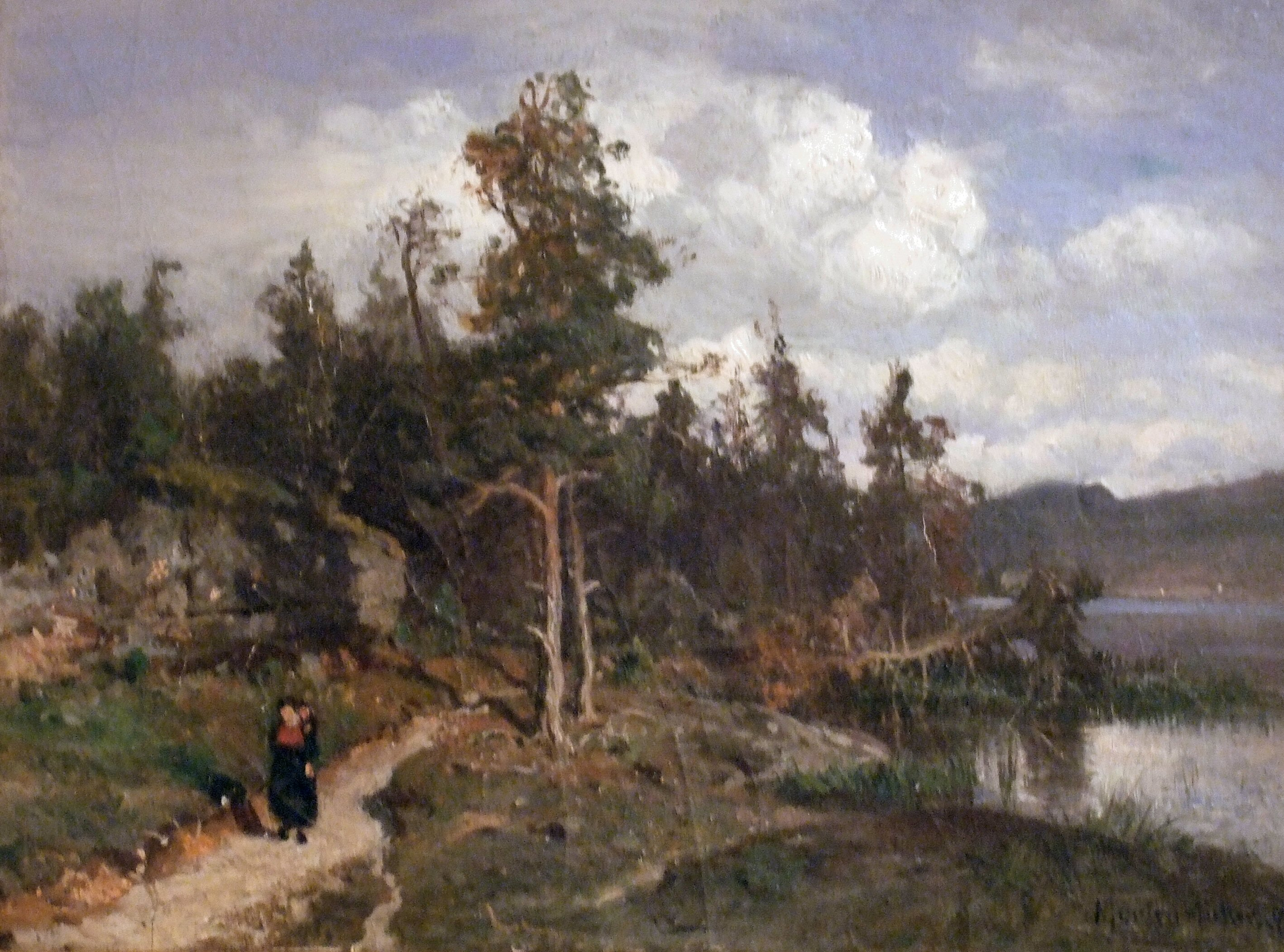 Painting